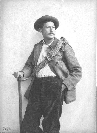 Wilhelm Paulcke, Geologe, Bergsteiger und Skiläufer